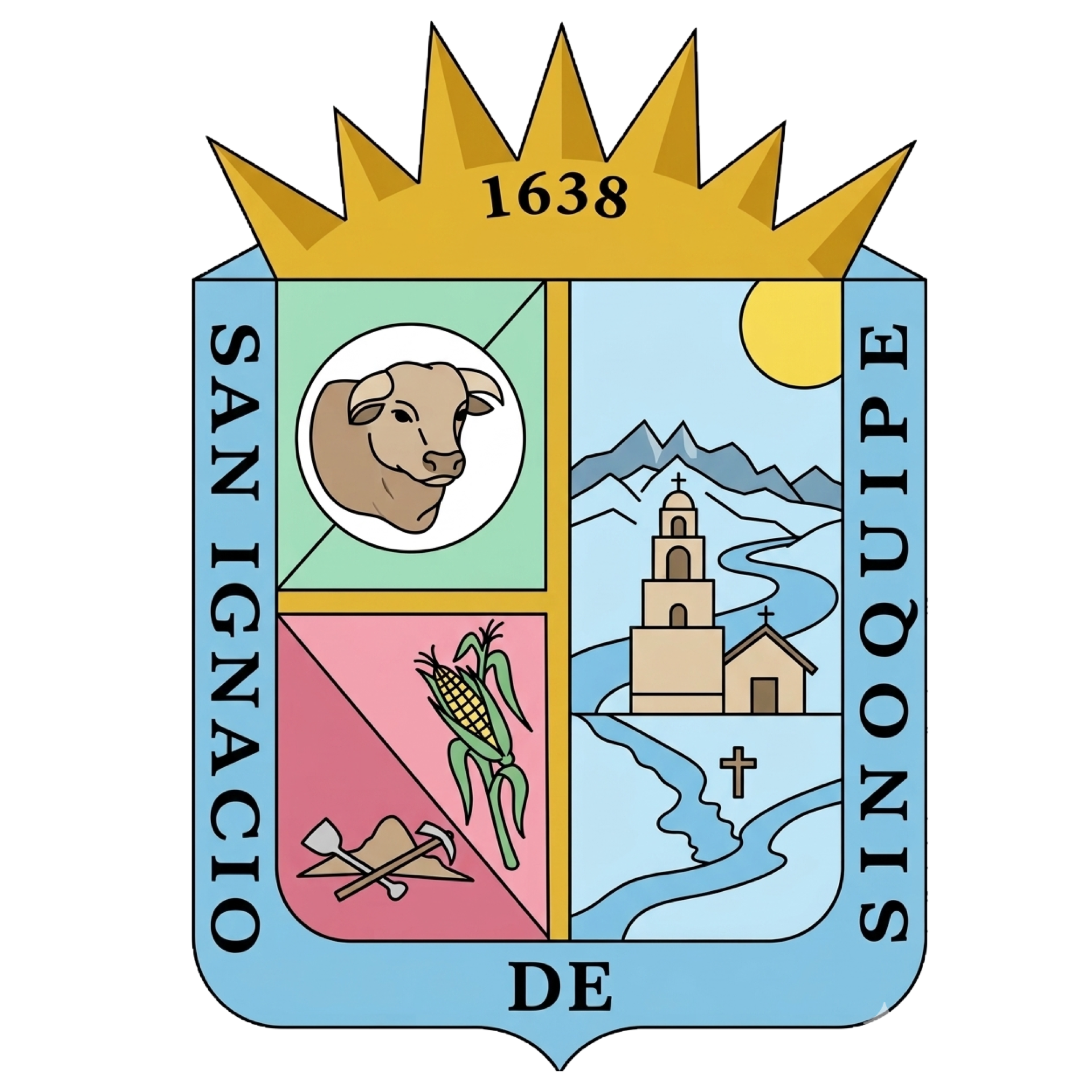 Escudo de armas de la comisaría de Sinoquipe del municipio de Arizpe, Sonora